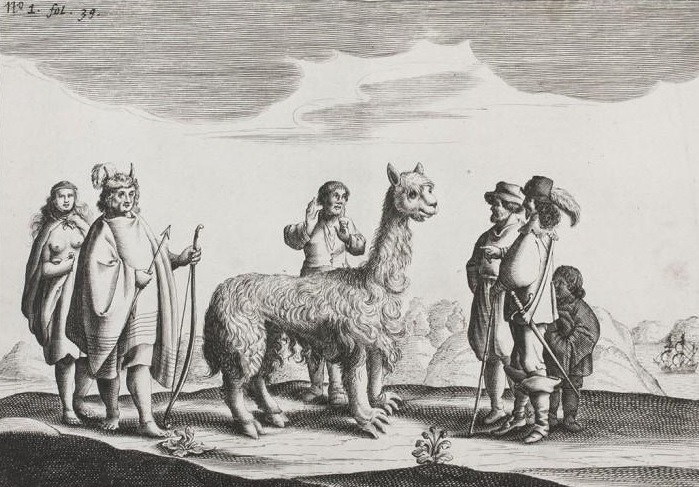 Expedición Holandesa de Hendrick Brouwen y Elías Herckmans en la ciudad de Valdivia, Chile en el año de 1643. "Journael ende historis verhael van de Reyse gedaen bij Costen de Straet Le Maire, naer de Custen van Chili, onder het beleyt van den Heer Generael Henrick Brouwer, inden Jare 1643"